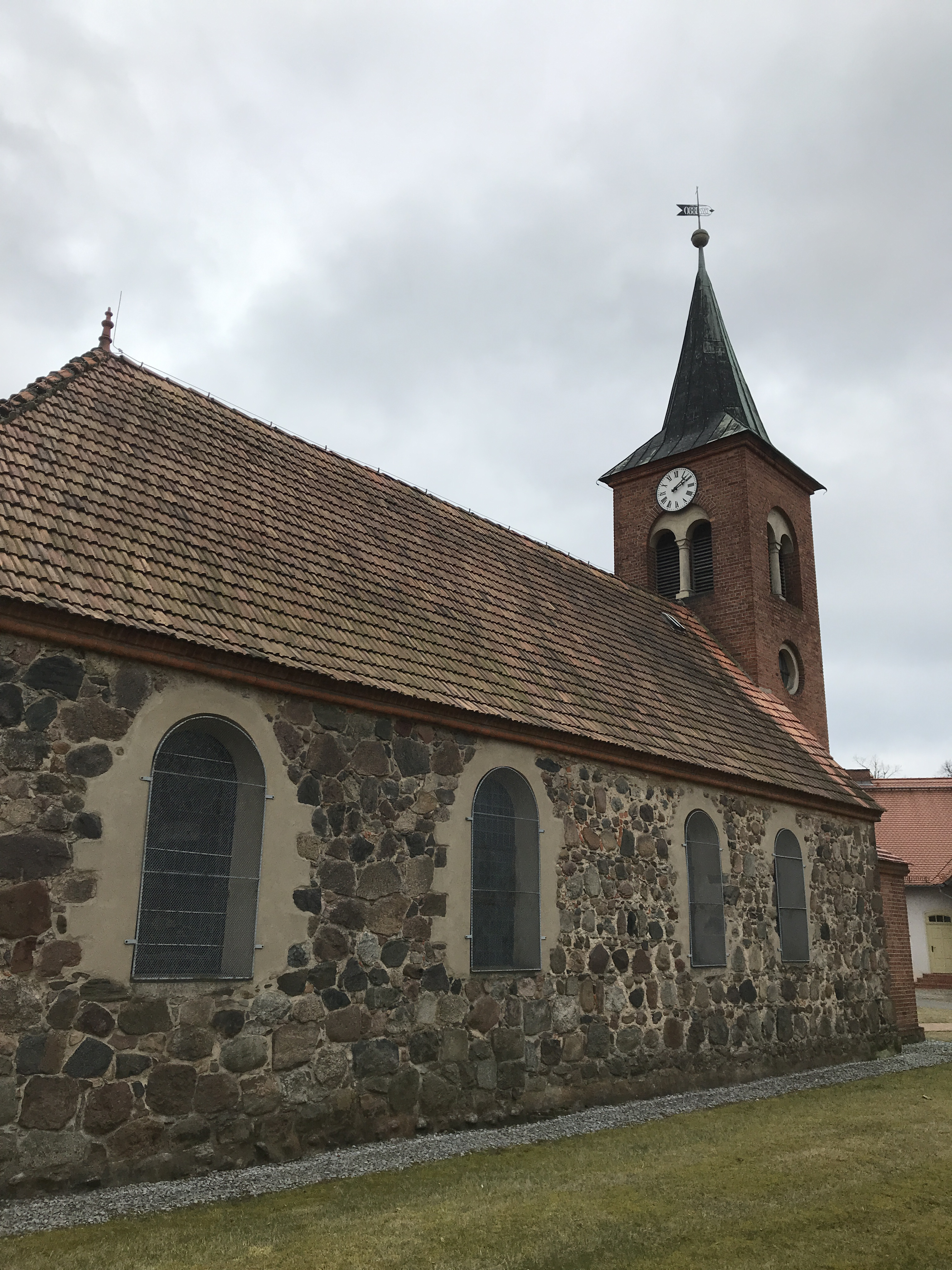 Die Dorfkirche Reppinichen ist eine spätgotische Feldsteinkirche in Reppinichen, einem Ortsteil der Gemeinde Wiesenburg/Mark im Landkreis Potsdam-Mittelmark in Brandenburg.